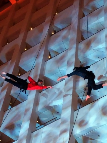 Vertical Dance Show im Berlin Marriott Hotel - Vertikaler Tanz als Showperformance mit Tänzern von Threesixty Shows